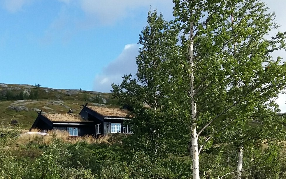 Toiture végétale et décoration de pignon, Sjoadalen, Jotunheimen, Norvège